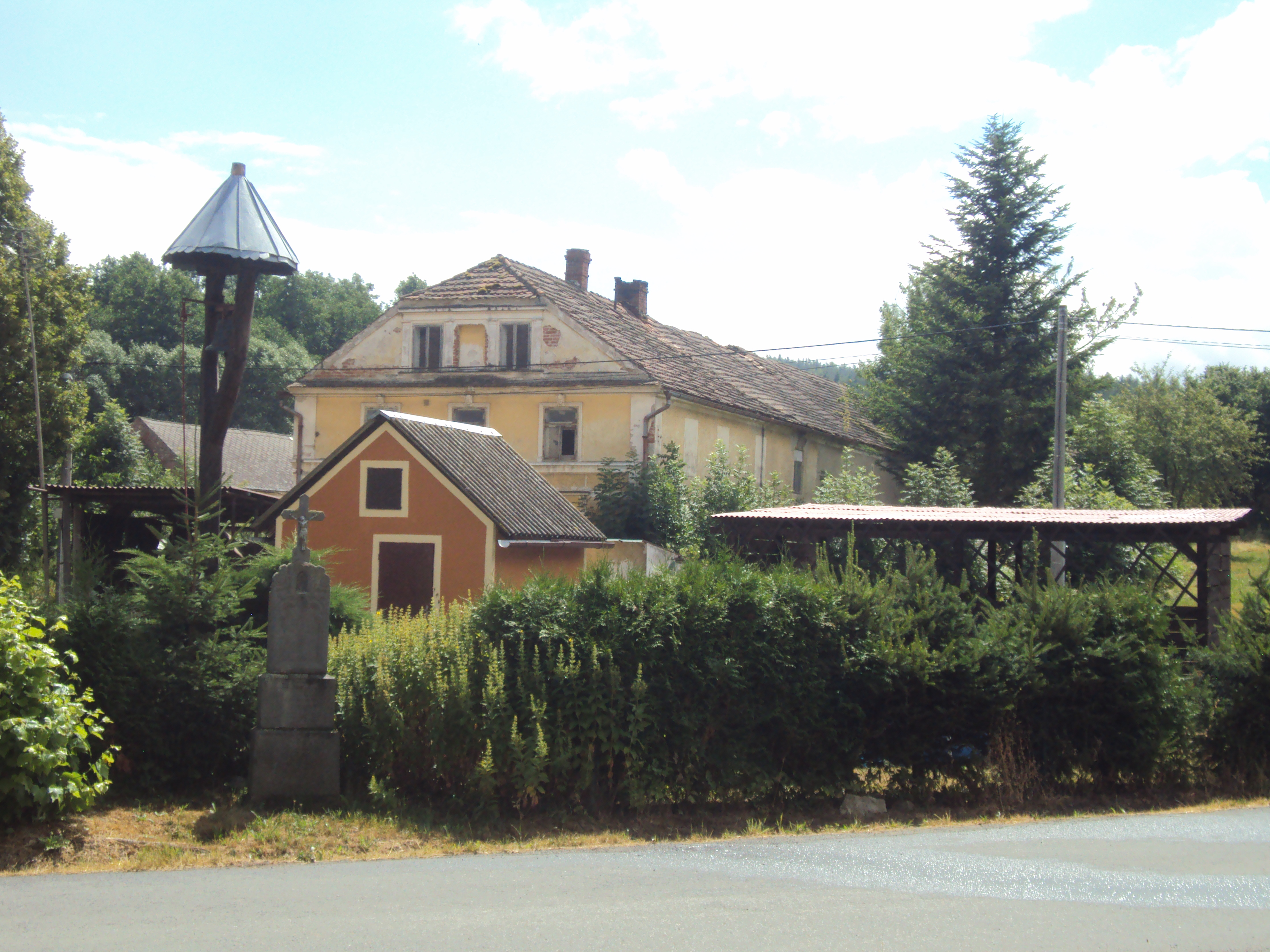 Ohnišťovice, centrální část vsi